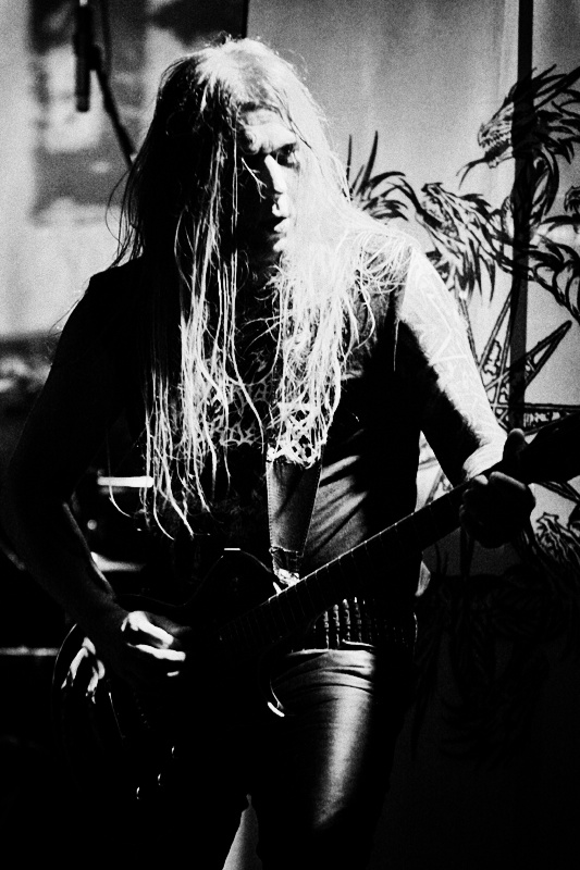 Deus Mortem, Wrocław, Firlej, 6.09.2011